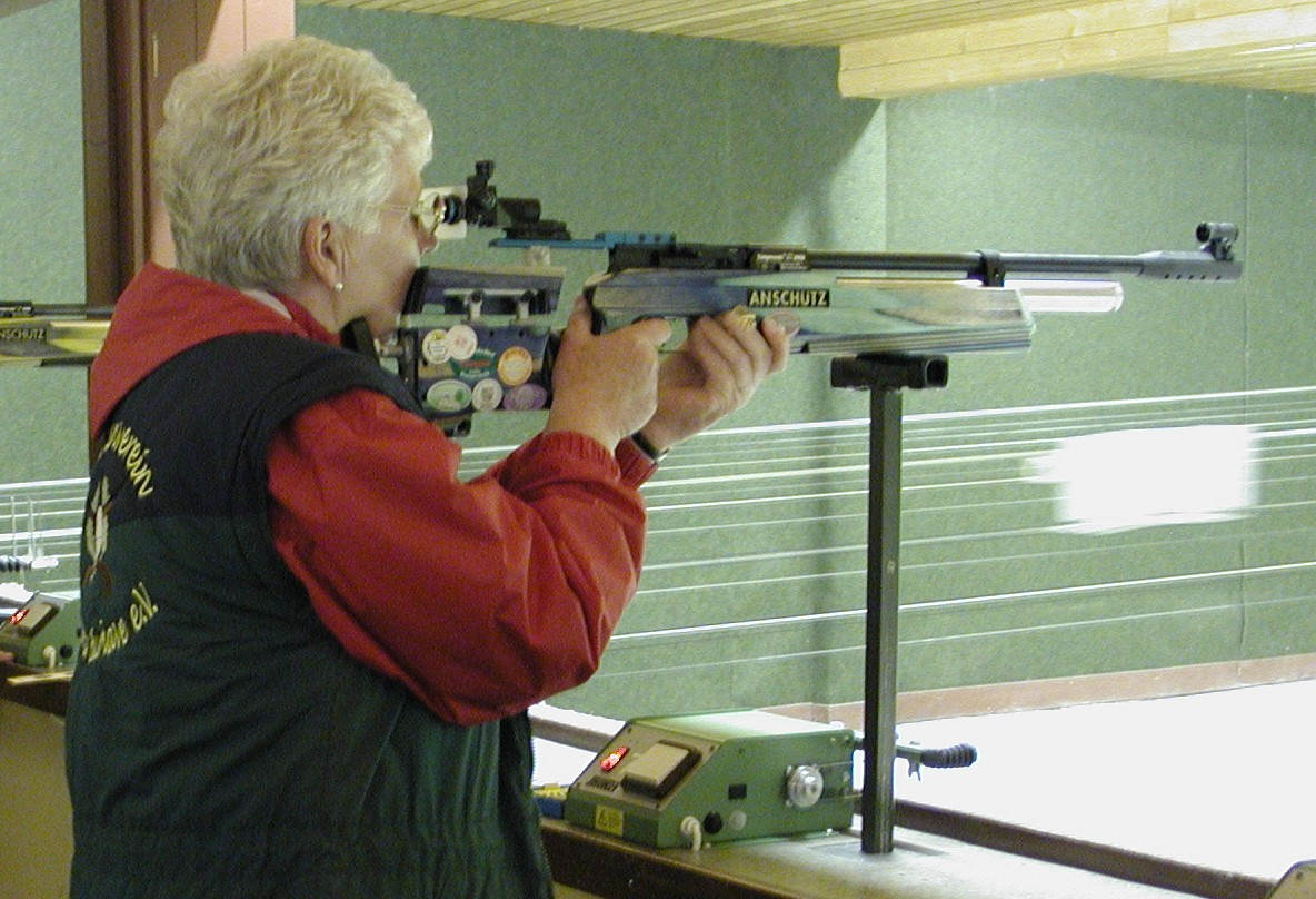 Schießdisziplin Luftgewehr-Auflage Motiv: Schießen mit einem aufgelegten Luftgewehr Foto: Wilfried Wittkowsky, 2004